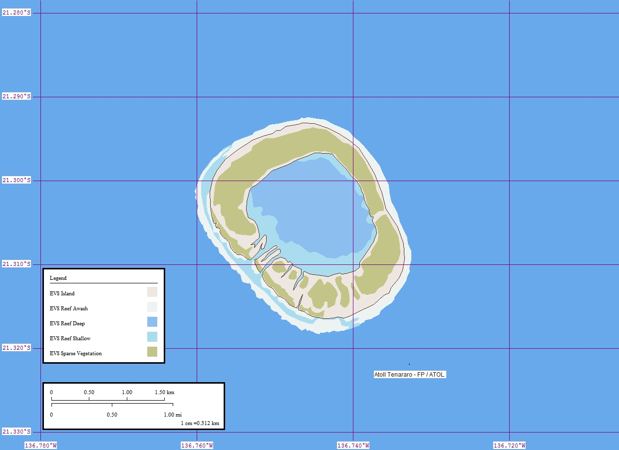 Het atol Tenararo